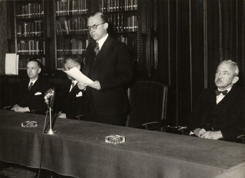 Meinoud Rost van Tonningen, Nederlands nationaal-socialist, tijdens zijn eerste toespraak als President van de Nederlandse Bank, Amsterdam 27 maart 1941.